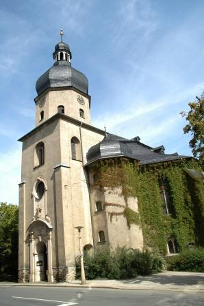 Copyrigt 2006 © Benjamin Barth die Lizenz erteile ich